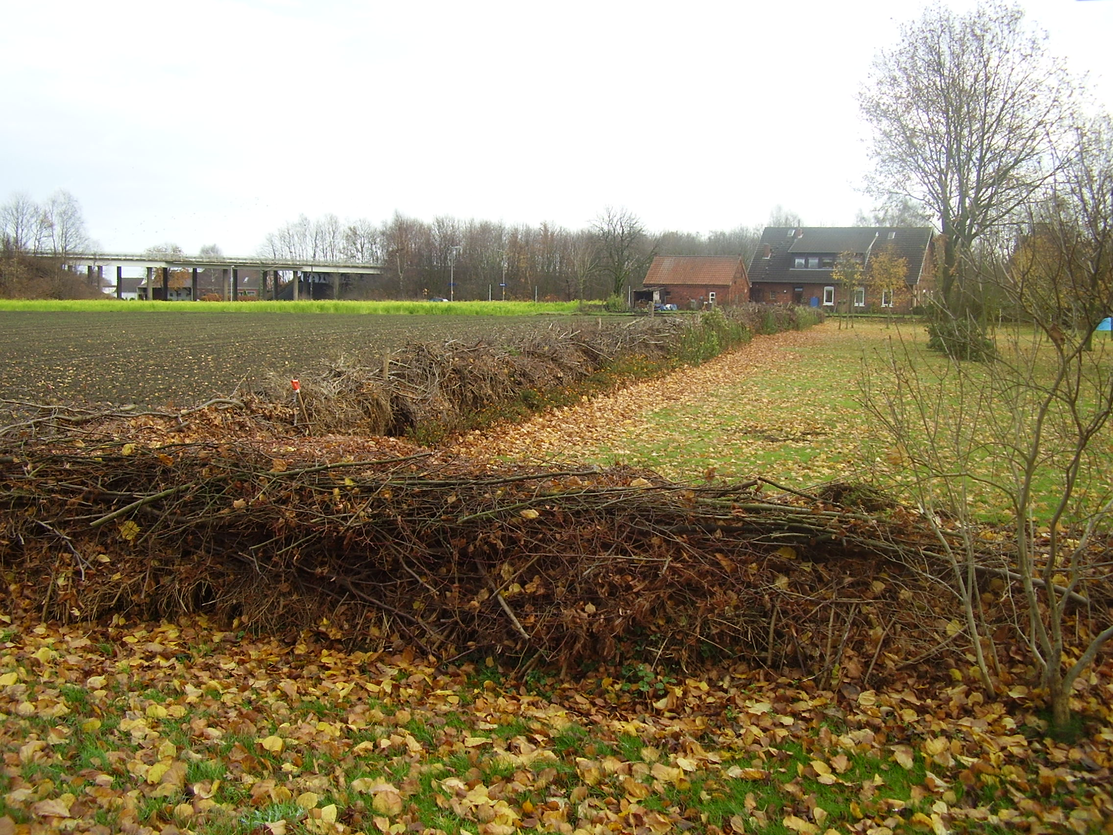 Syke; ortsteil Barrien, Niedersachsen; fotografiert: November 2008